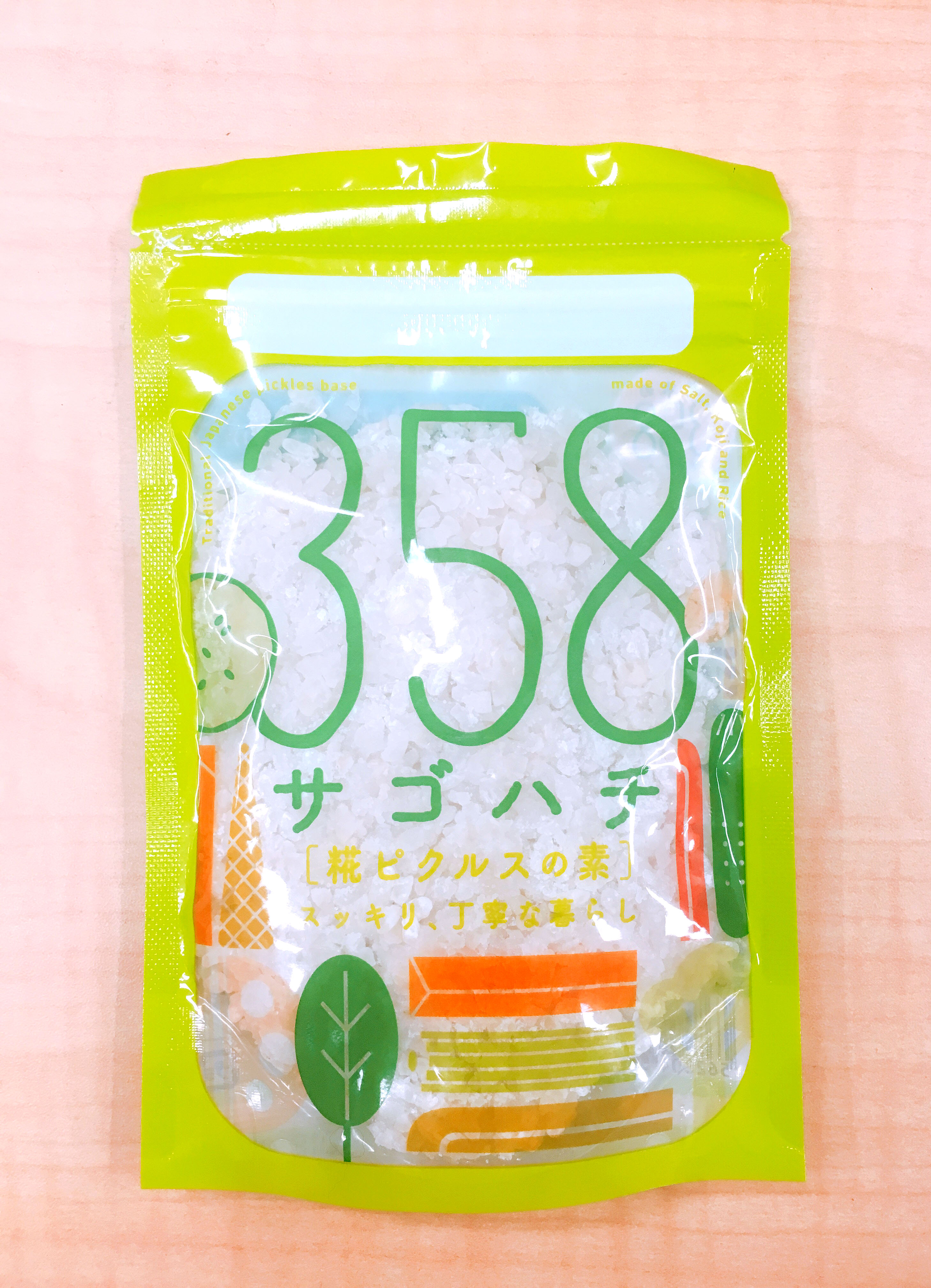 福島の伝統食材「三五八」をリブランディング